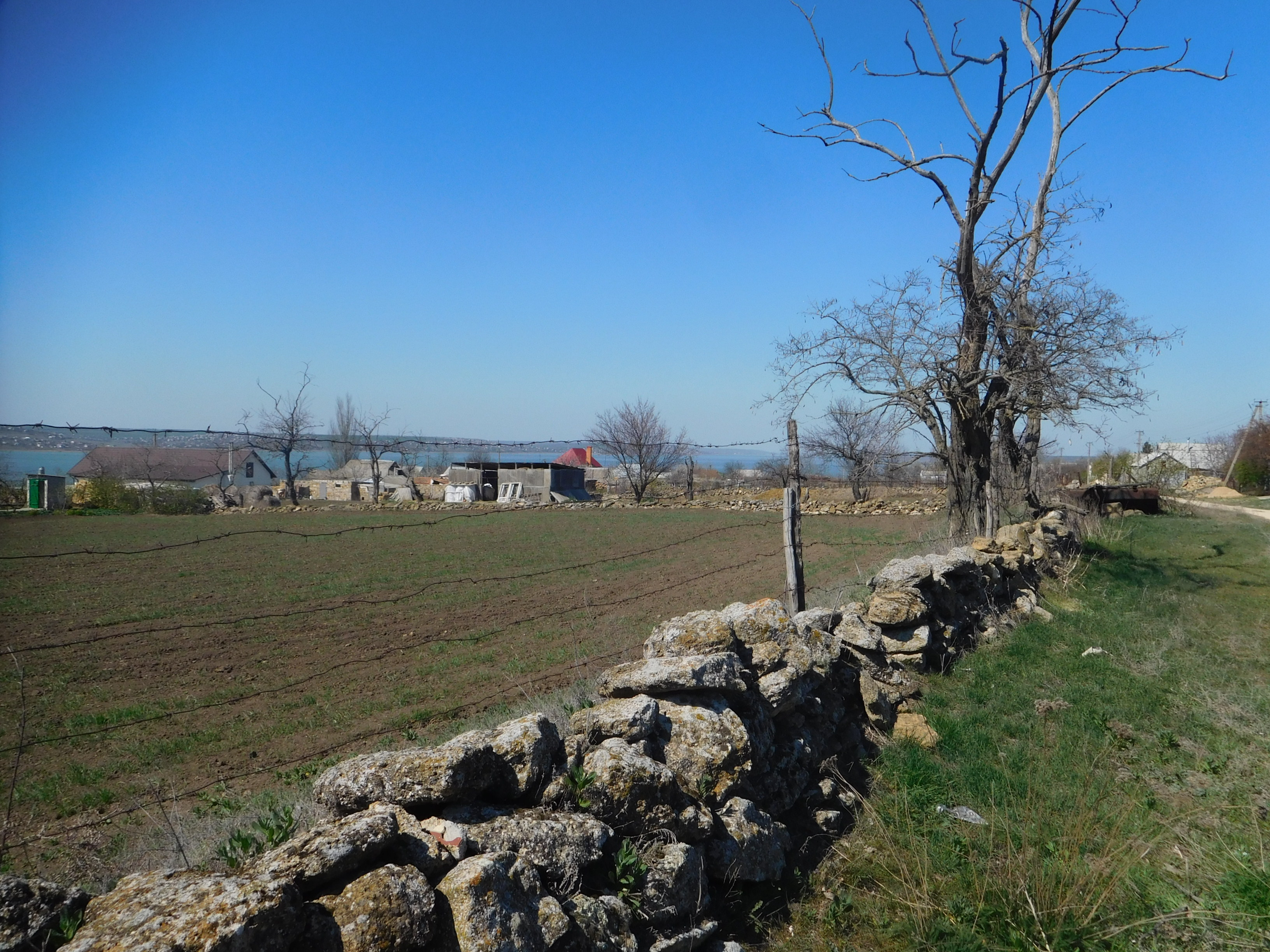 с. Нова Еметівка, Міжлимання, Одеська область